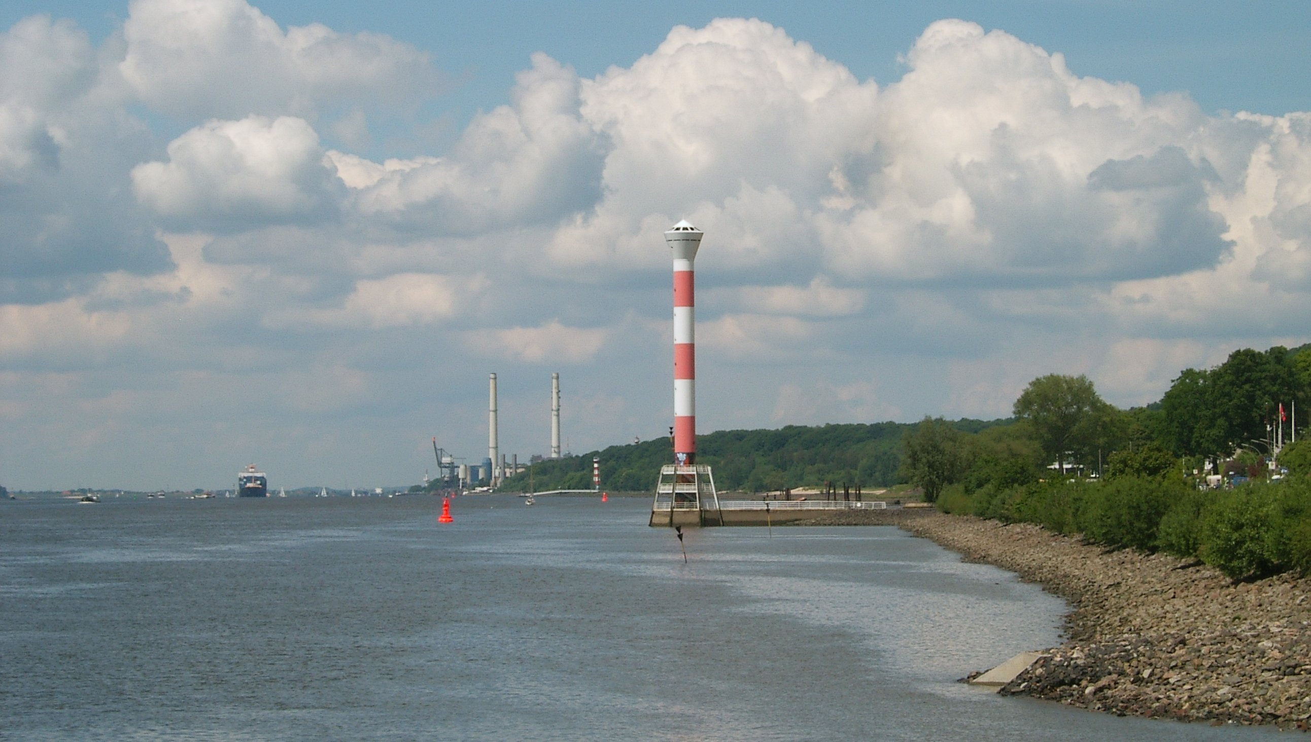 Höhe Strandweg in Hamburg-Blankenese, Unterfeuer Blankenese im Vordergrund, Hinten auf gleicher Uferseite das Unterfeuer Wittenbergen, dahinter die beiden großen Schornsteine des Kohlekraftwerks Wedel. Blick entlang der Elbe Richtung Nordsee.